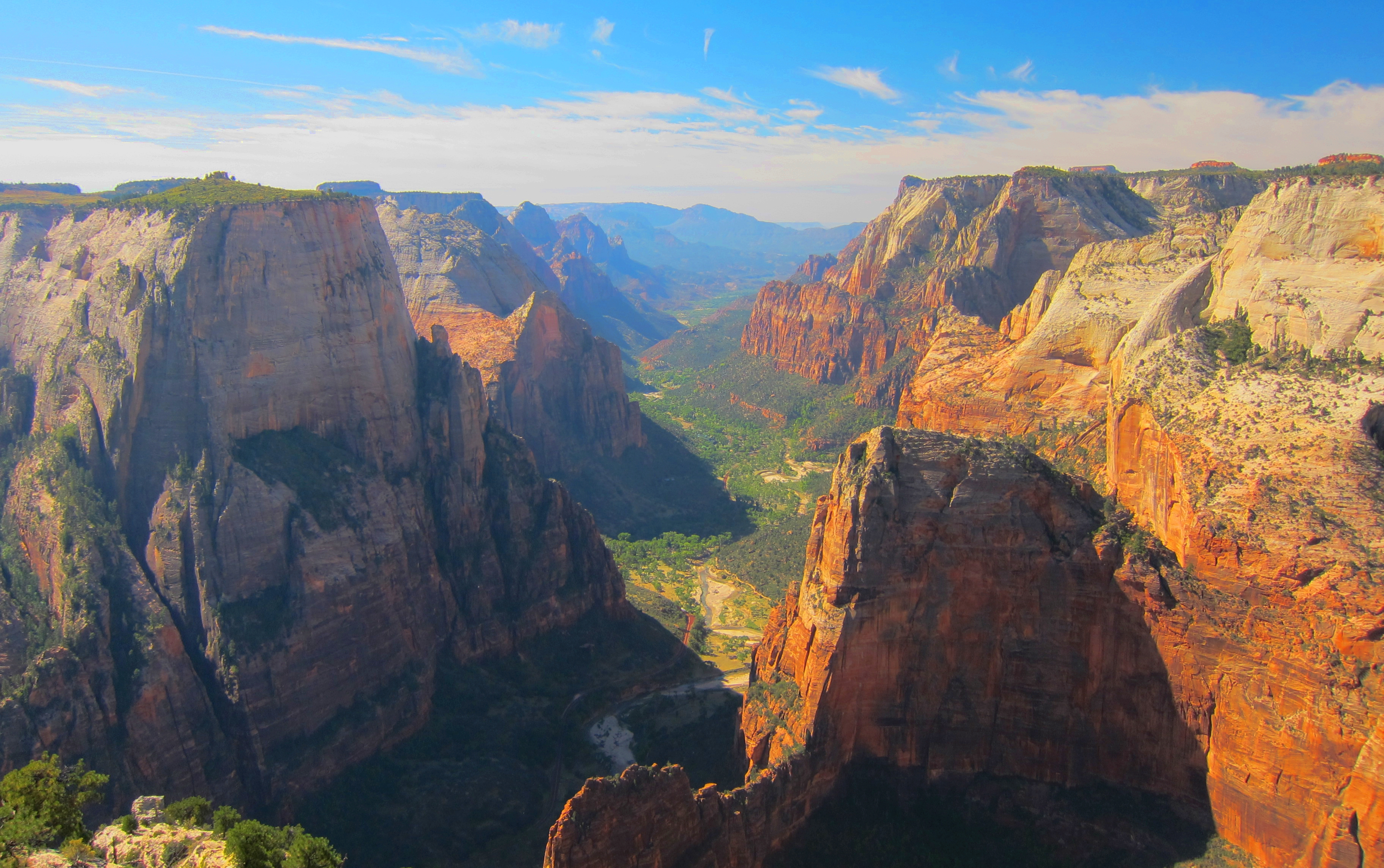 Vue du canyon depuis le point d'observation situe a la fin du Observation Point trail